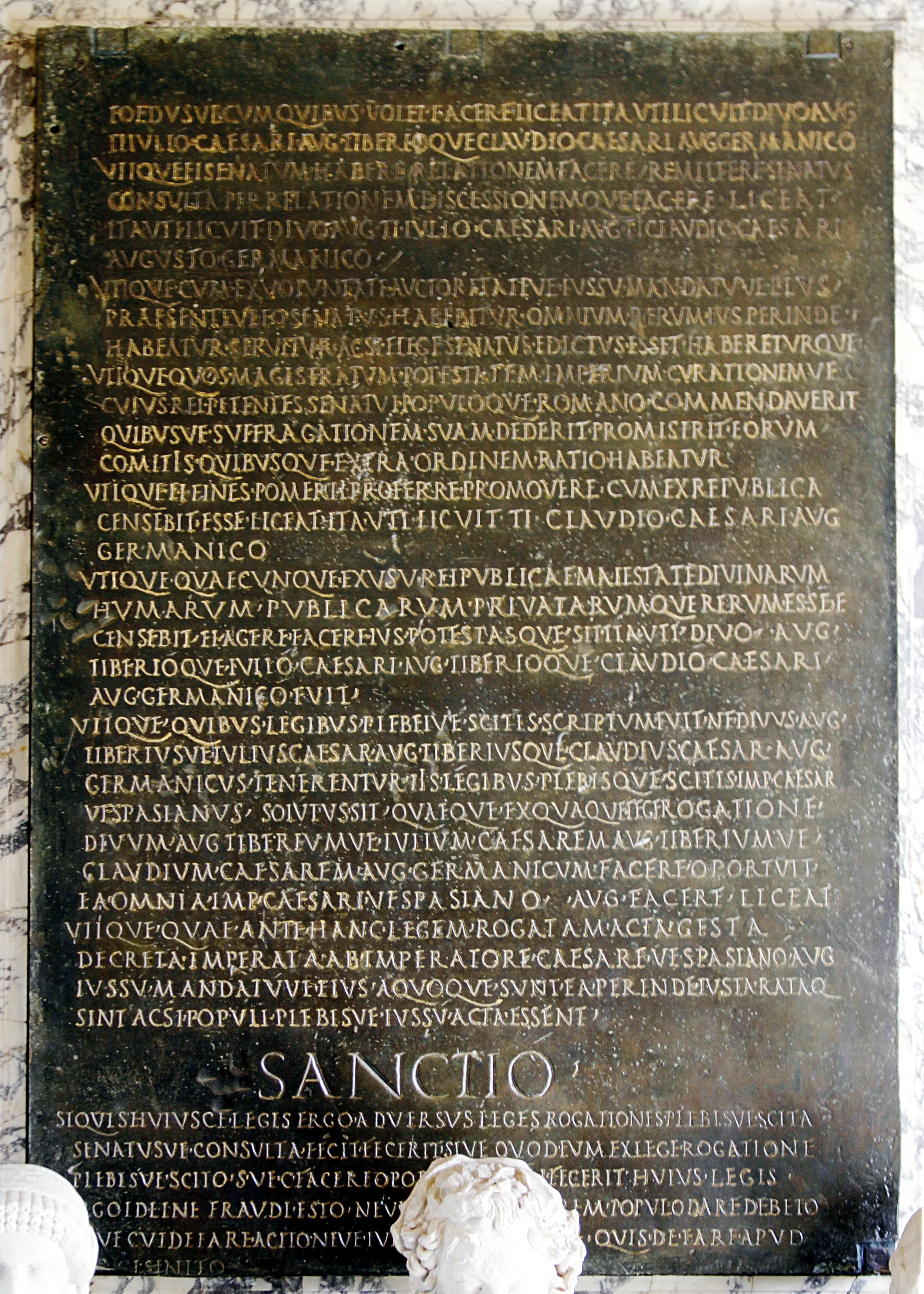 Palazzo Nuovo - Musei Capitolini - Rome